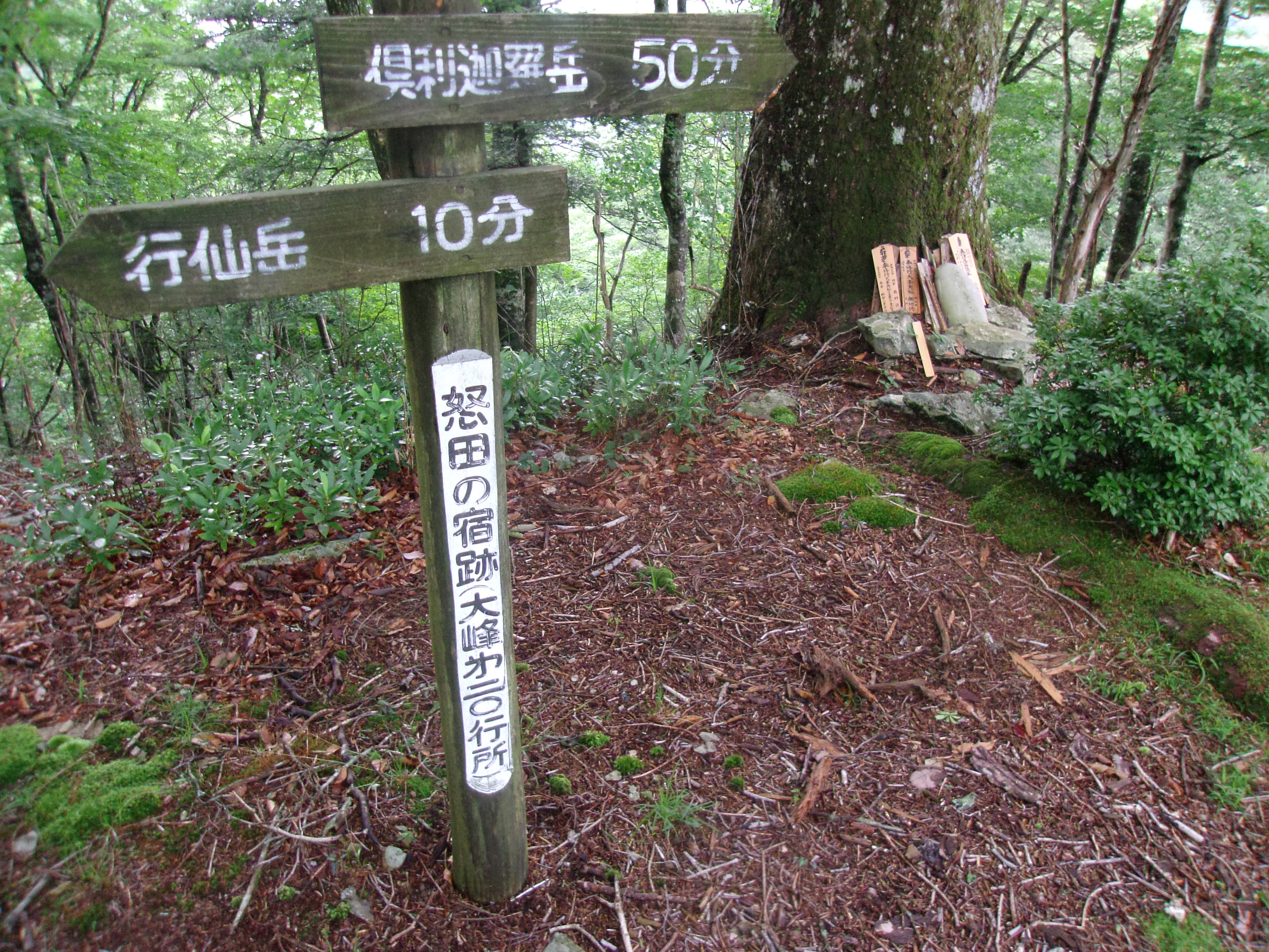 大峯奥駈道第20靡「怒田宿」